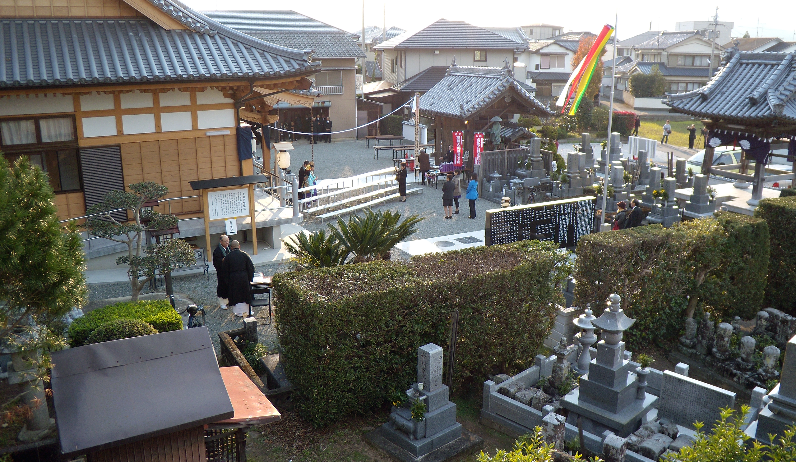 ２００９年落慶法要